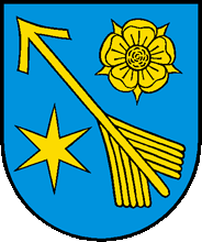 Wappen von Nidfurn Kanton Glarus Schweiz